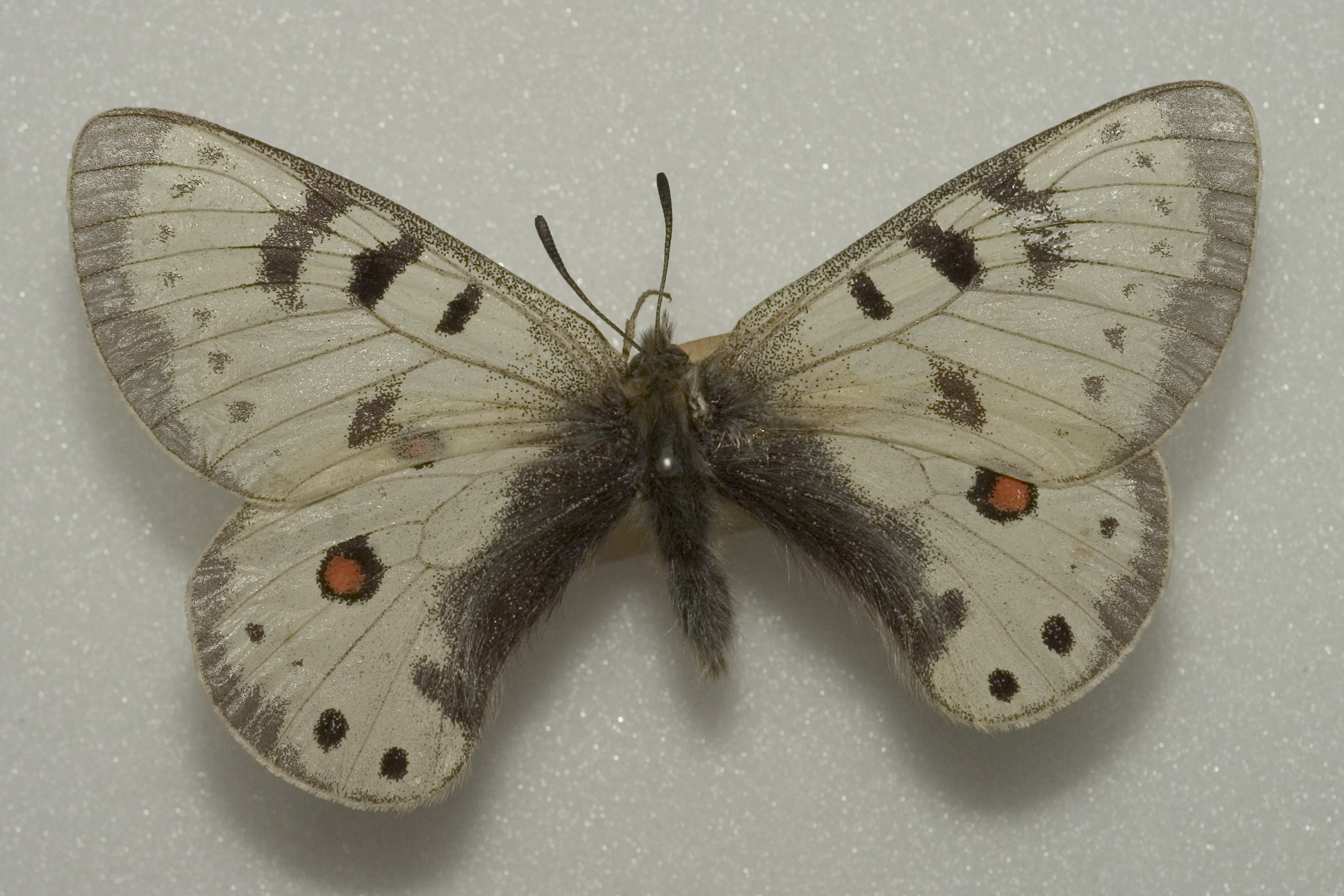 Parnassius nordmanni Mal Kharwak, Hindu Kush Ex Hill Museum